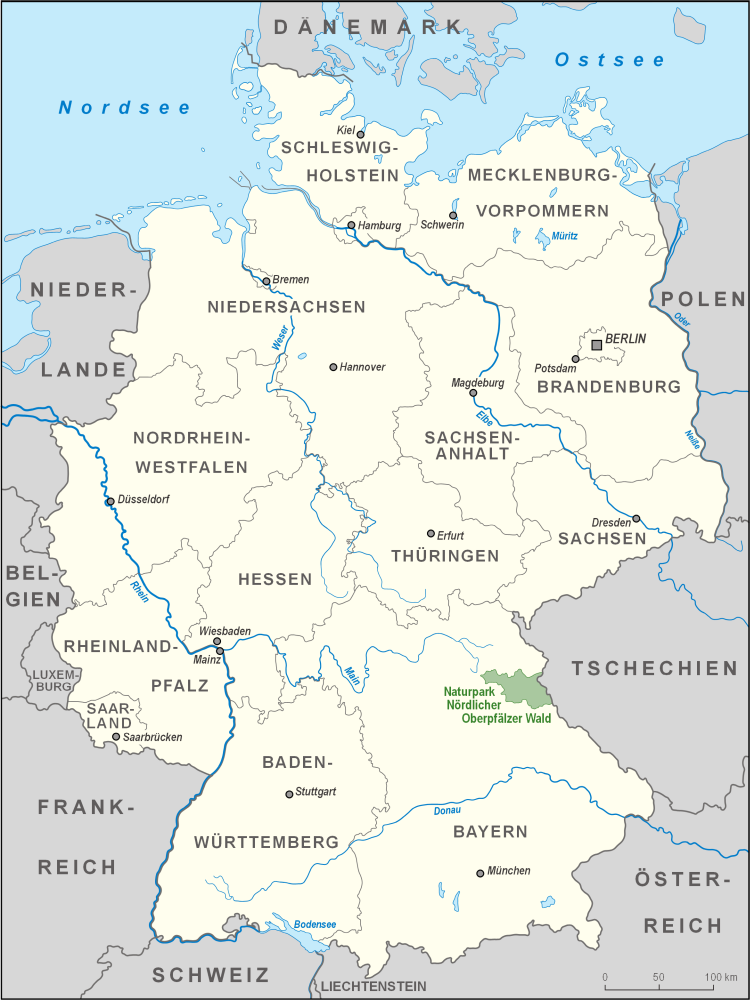 Karte des Naturparks Nördlicher Oberpfälzer Wald in Deutschland